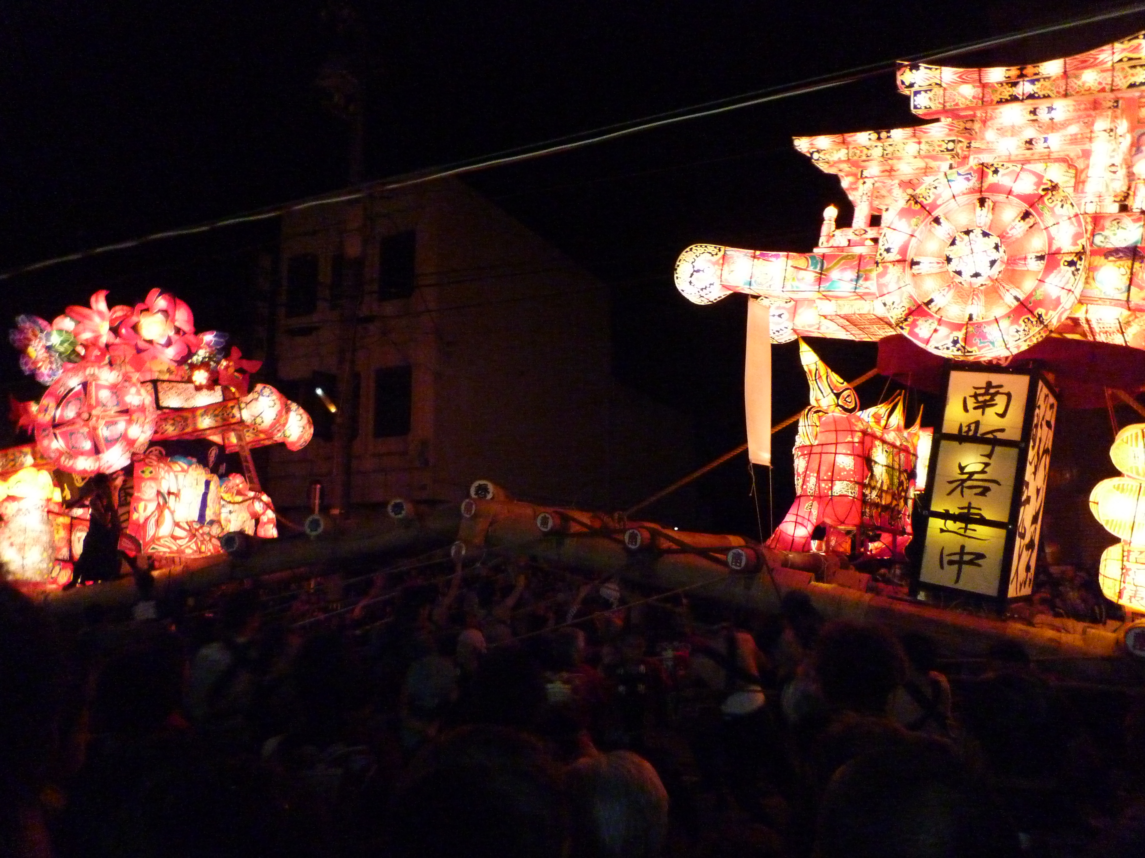 富山県砺波市で行われる砺波夜高祭の喧嘩「突き合わせ」です。